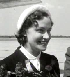 Katheen Ferrier in 1951